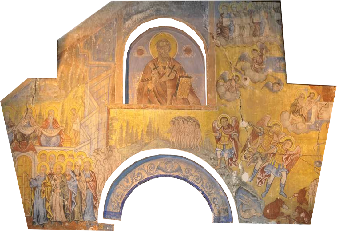 Стенопис от църквата „Свети Никола“ в демирхисарското село Сопотница, Република Македония